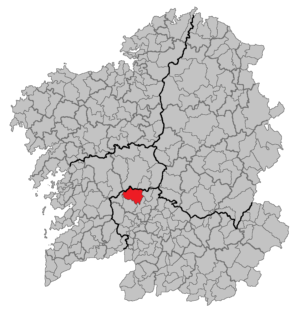 Mapa coa localización do concello de O Irixo.